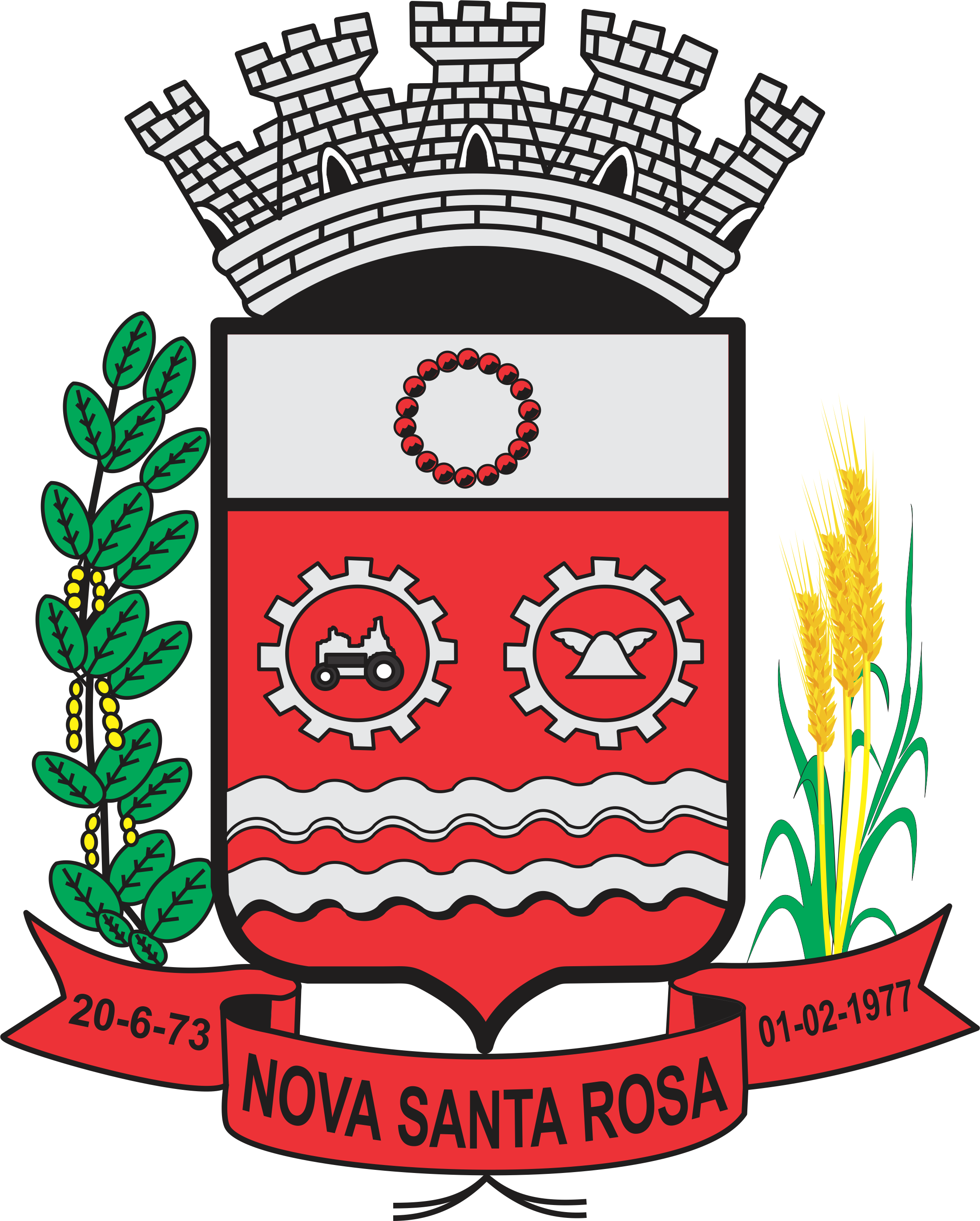 Brasão do Município de Nova Santa Rosa